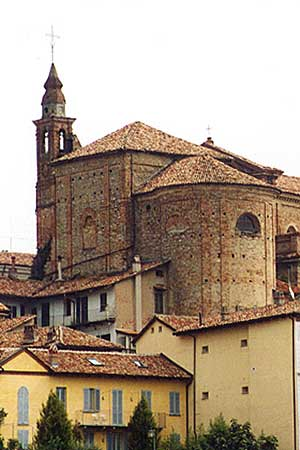 La Morra (prov. di Cuneo): chiesa di San Rocco